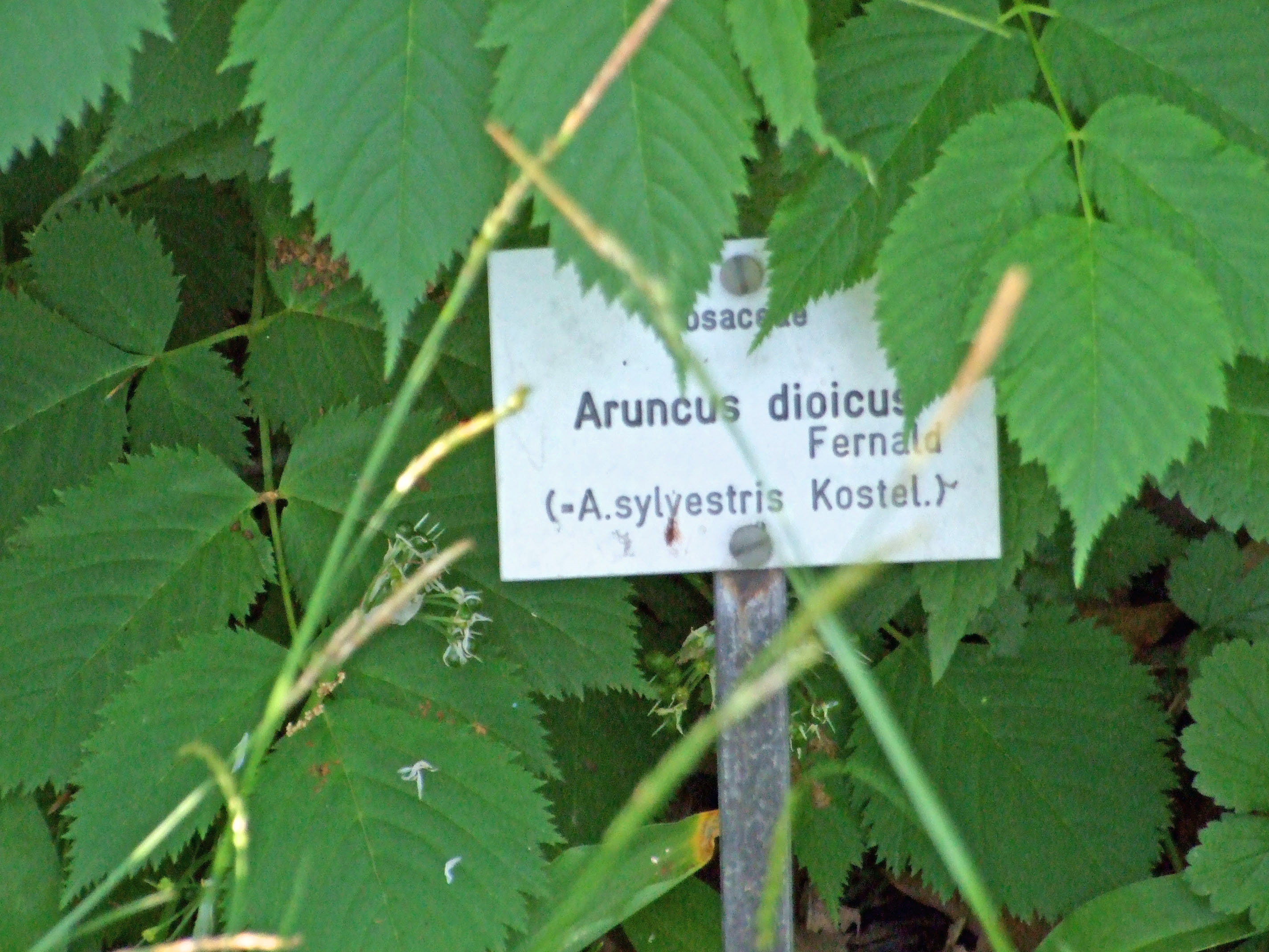 Botanischer Garten Ffm, Siesmayerstraße, Aruncus dioicus